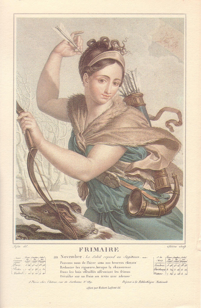 French Revolutionary Calendar FRIMAIRE 22 Novembre: Le Soleil répond au Sagittaire Pouvons nous de l'hiver sous nos heureux climats Redouter les rigueurs lorsque la chasseresse Dans les bois effeuillés affrontant les frimas Décoche sur un Daim ses traits avec adresse